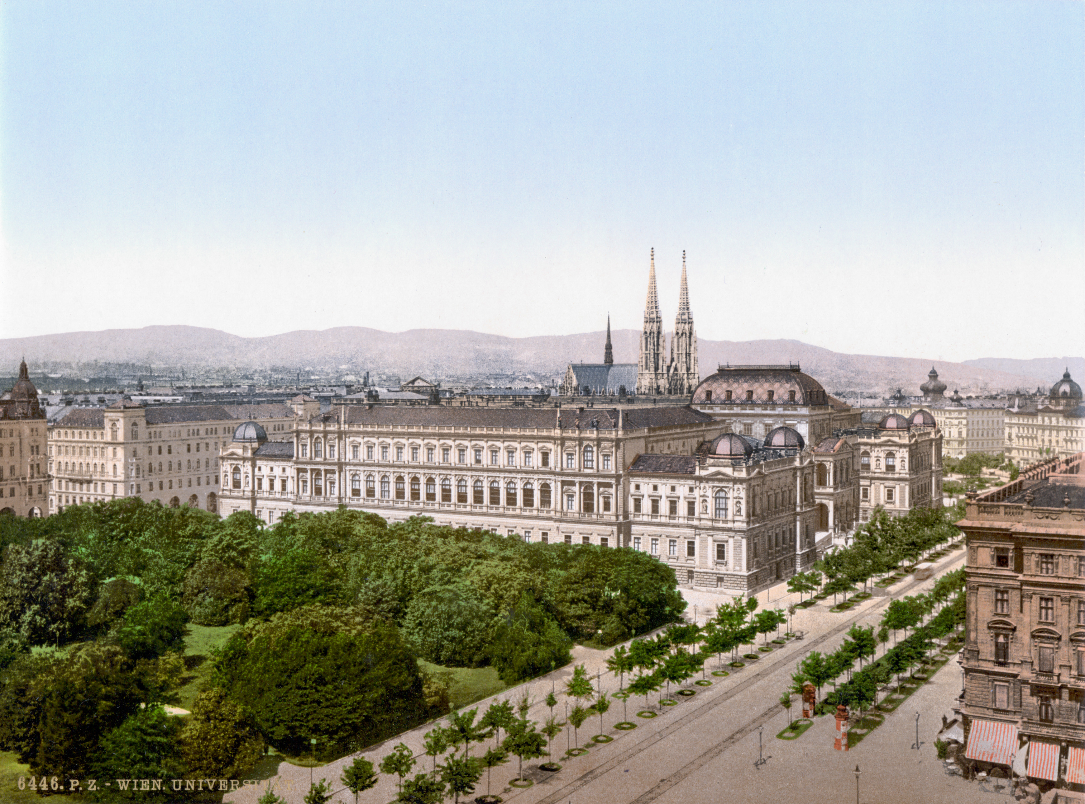 Wiener Universität zwischen 1890 und 1900